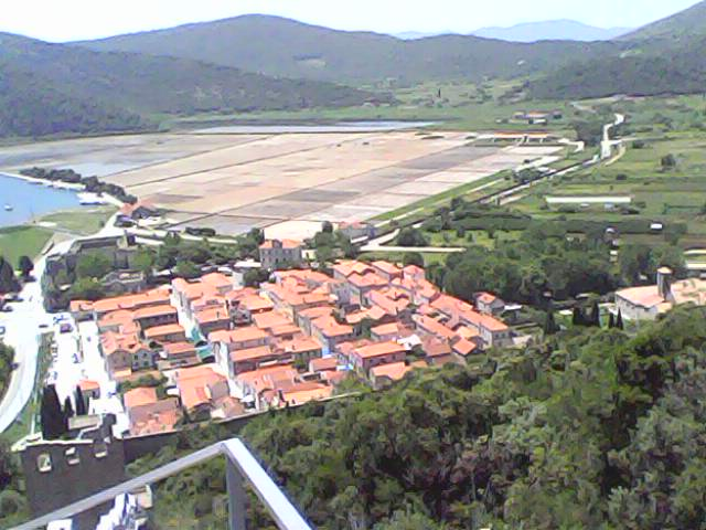 pogled na Ston sa zidina